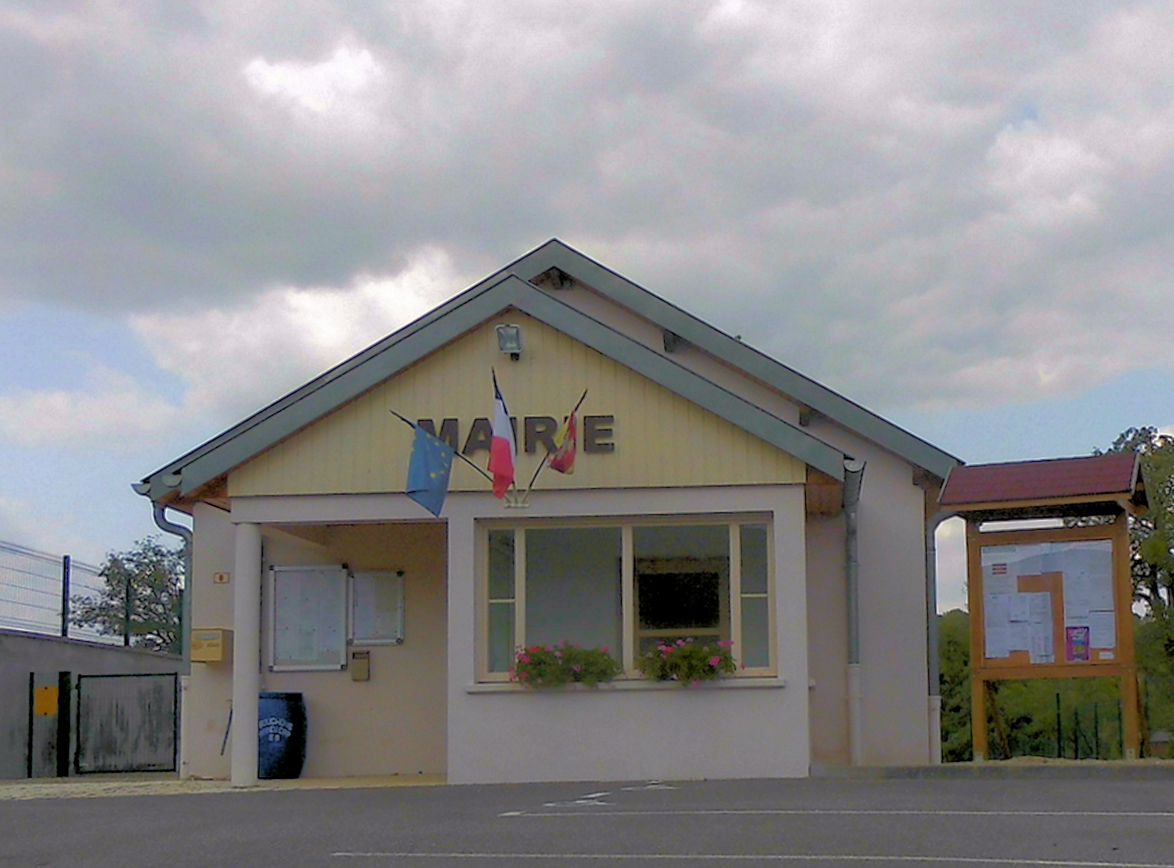 La mairie de Barville